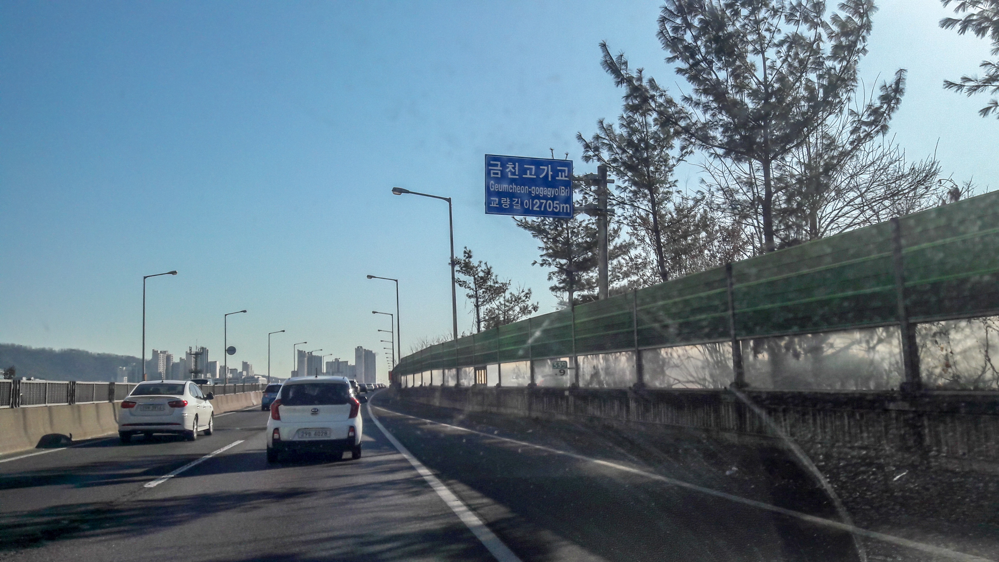 서해안고속도로 금천고가교 당진 방면 표지판